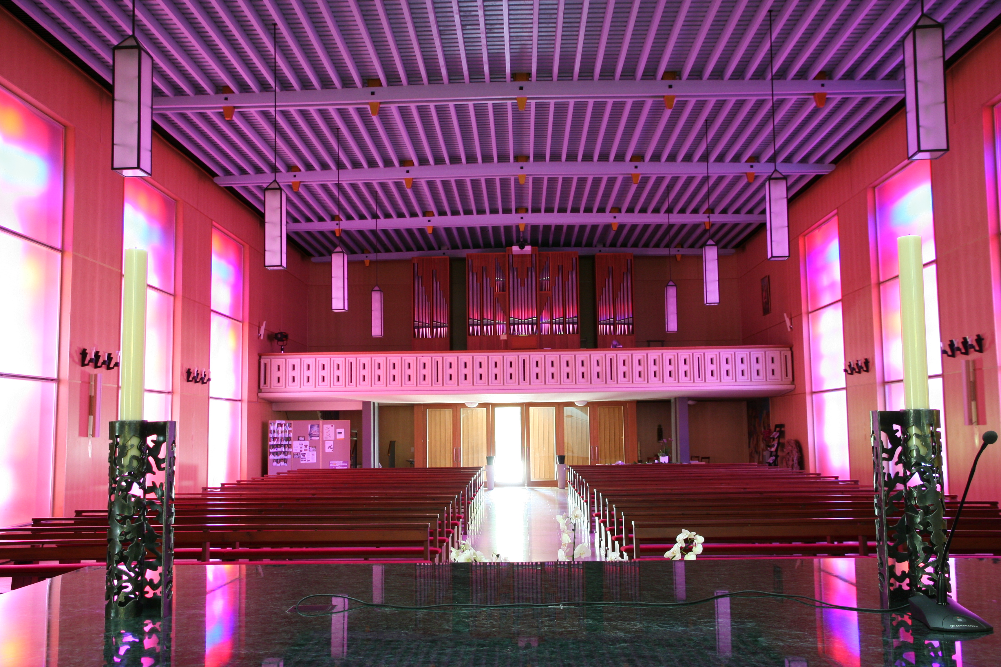 Römisch-katholische Pfarrkirche St. Martin Meilen, Innenansicht